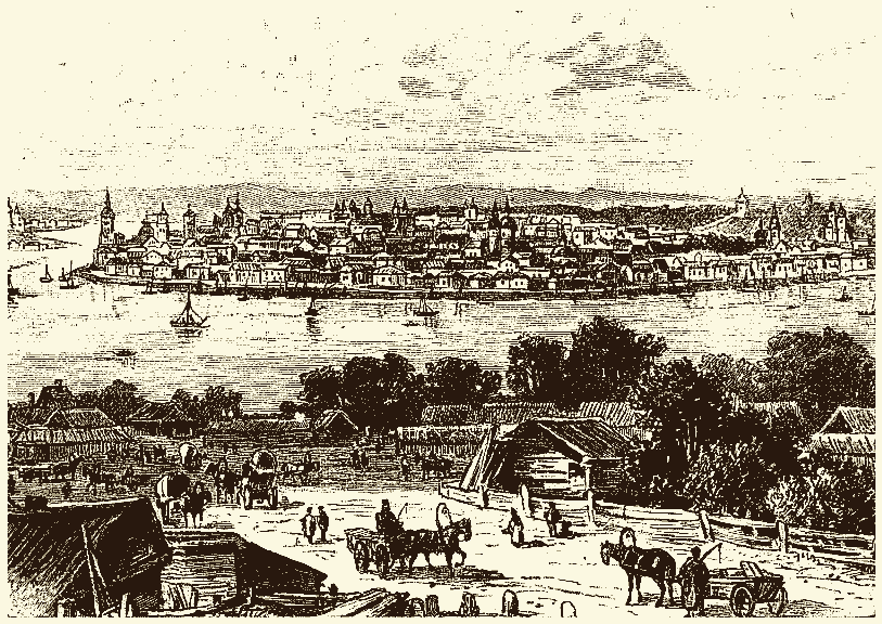 г. Иркутск.